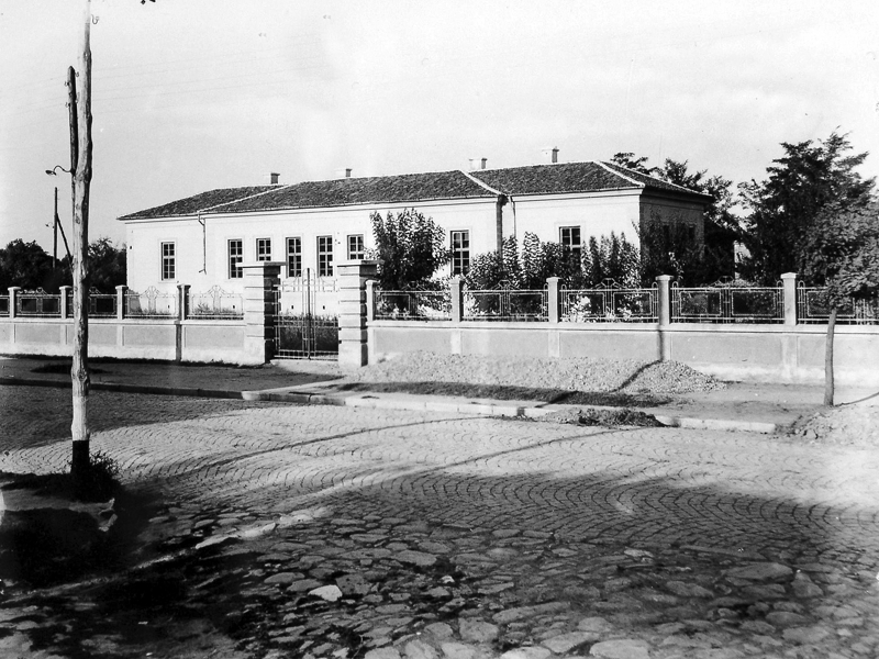 Сградата на начално училище “Г. Брегов”, строена 1890 г. Снимката е предоставена с любезното съдействие на РИМ – гр. Пазарджик